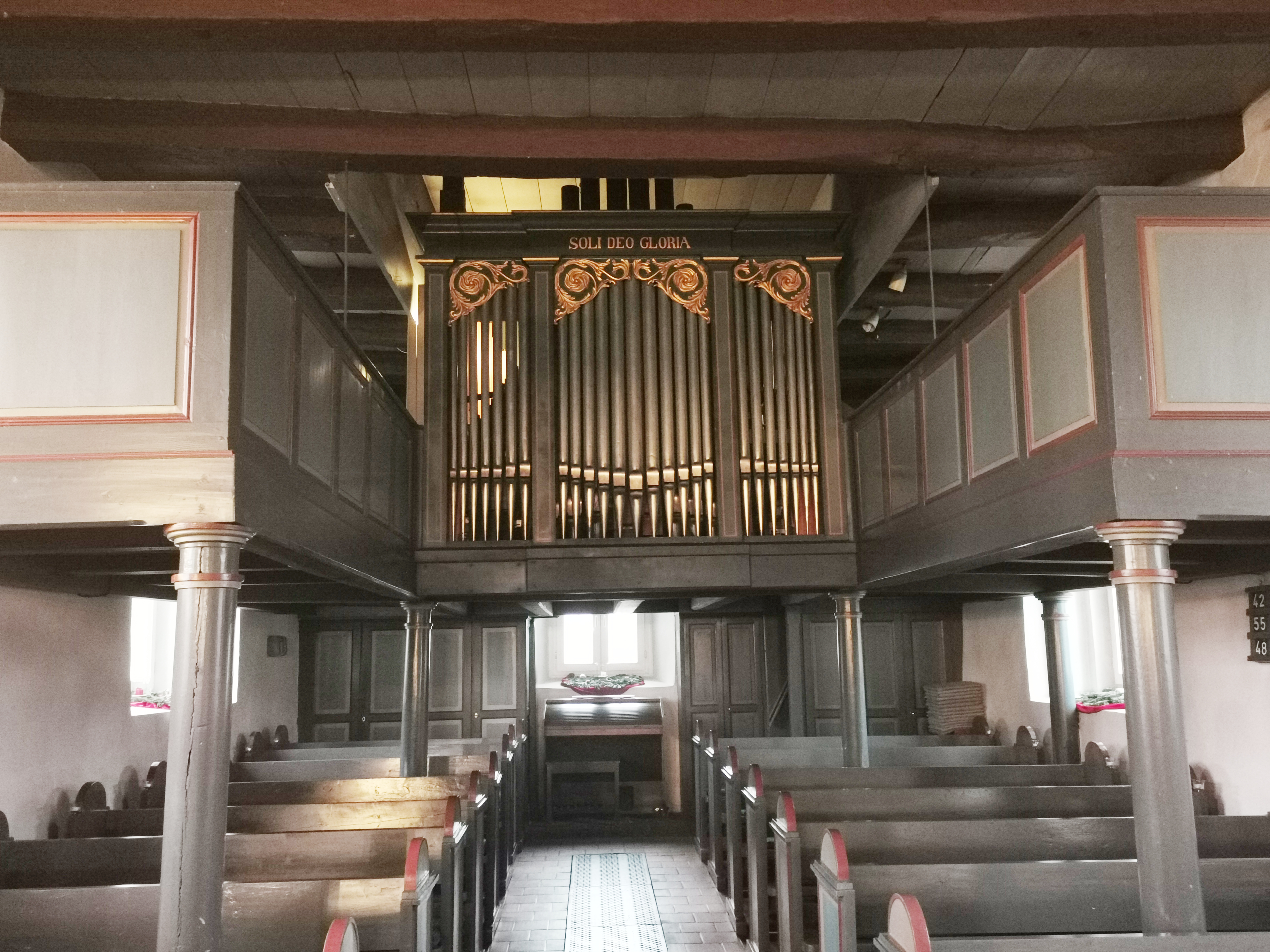 Innenansicht Kirche Süderhastedt